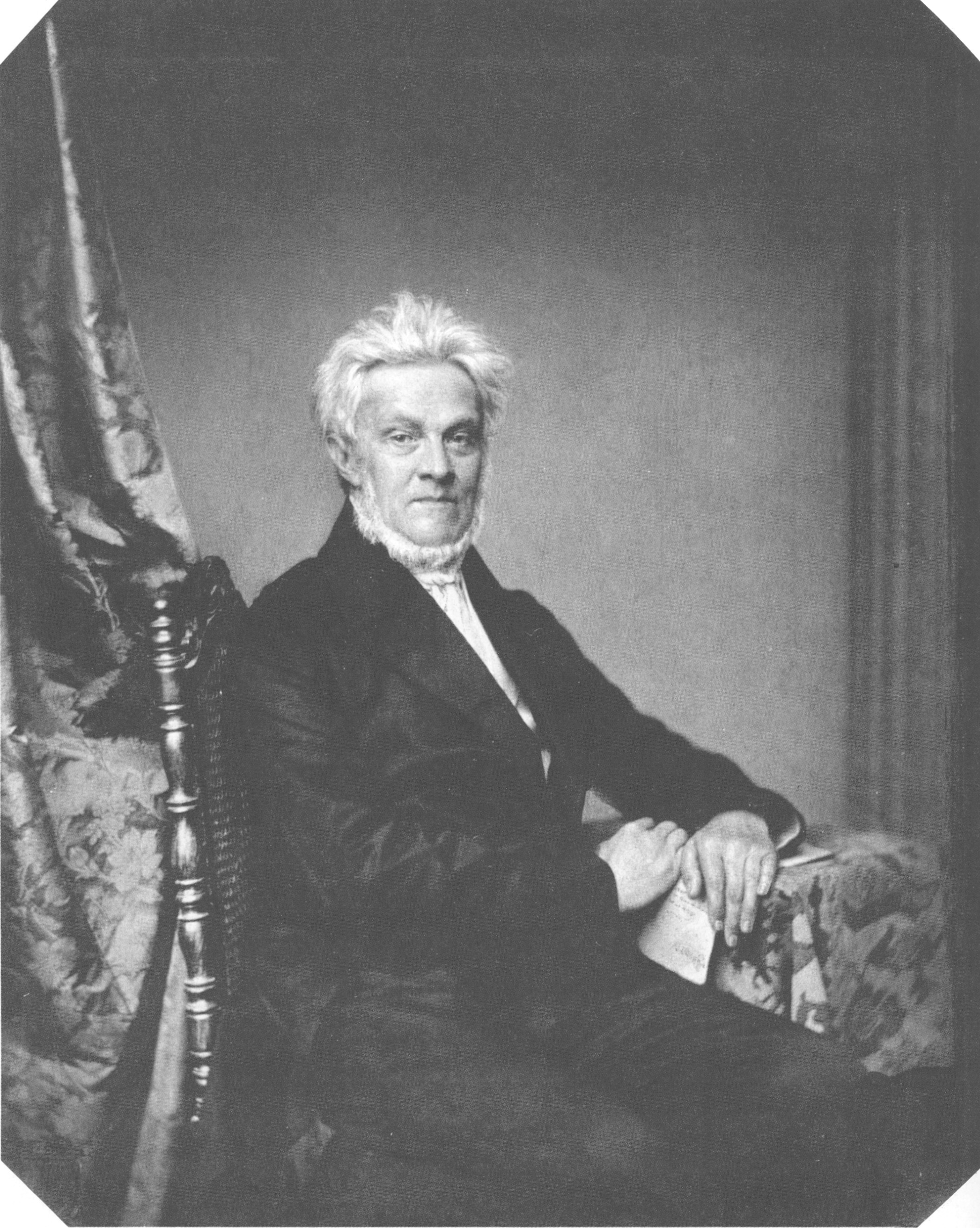 Karl Joseph Anton Mittermaier (1787-1867)